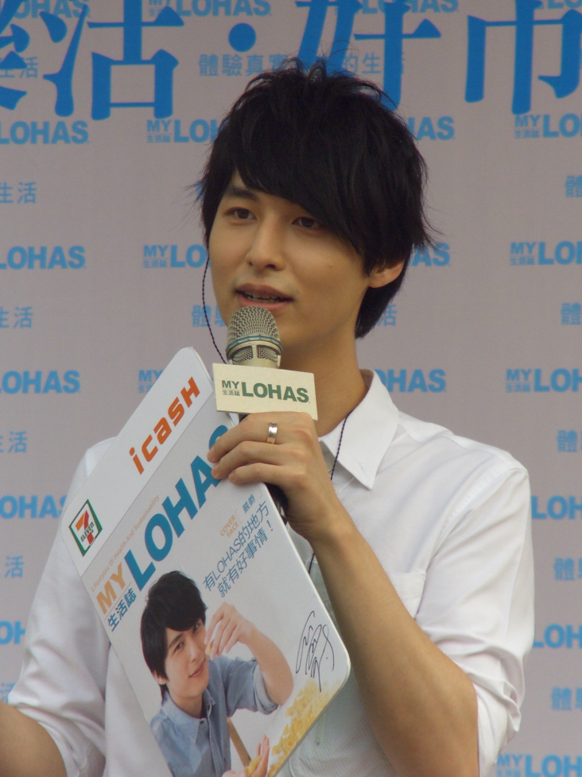 LOHAS 樂活好市集